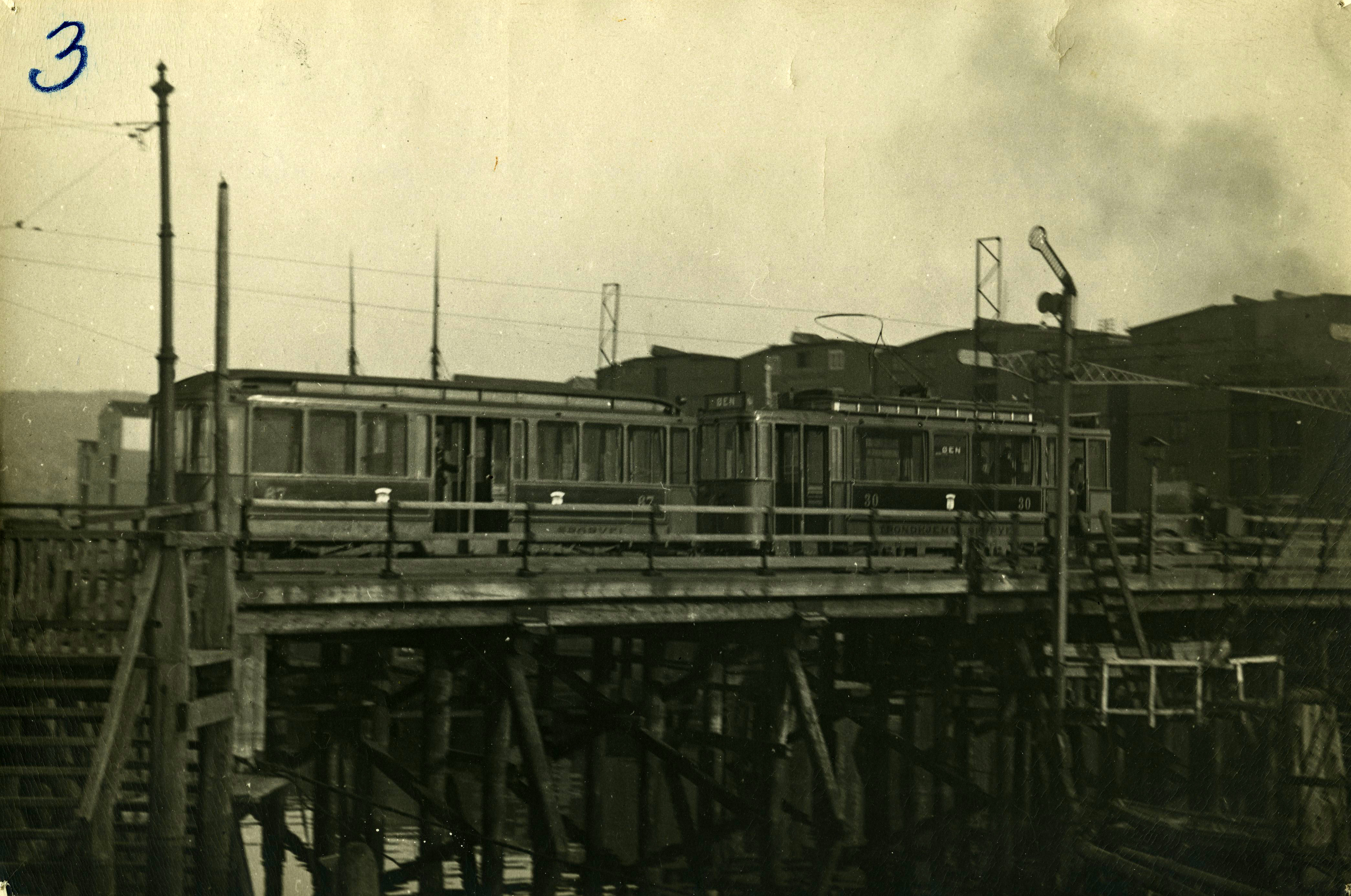 Format: Fotopositiv. Sporvognsett over den gamle Bakke bru før den ble skiftet ut. Bildet er fra ca 1920. Den nye Bakke bru, med dobbeltspor, ble åpnet den 30. November 1929. Ukjent fotograf.